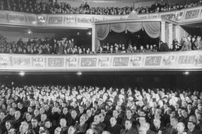 Berlin, Volkskongress in der Staatsoper Volkskongreß in der Staatsoper UBz: die Delegierten aus allen Zonen. Aufn.: Heinscher-Illus 8.12.47 1017-47